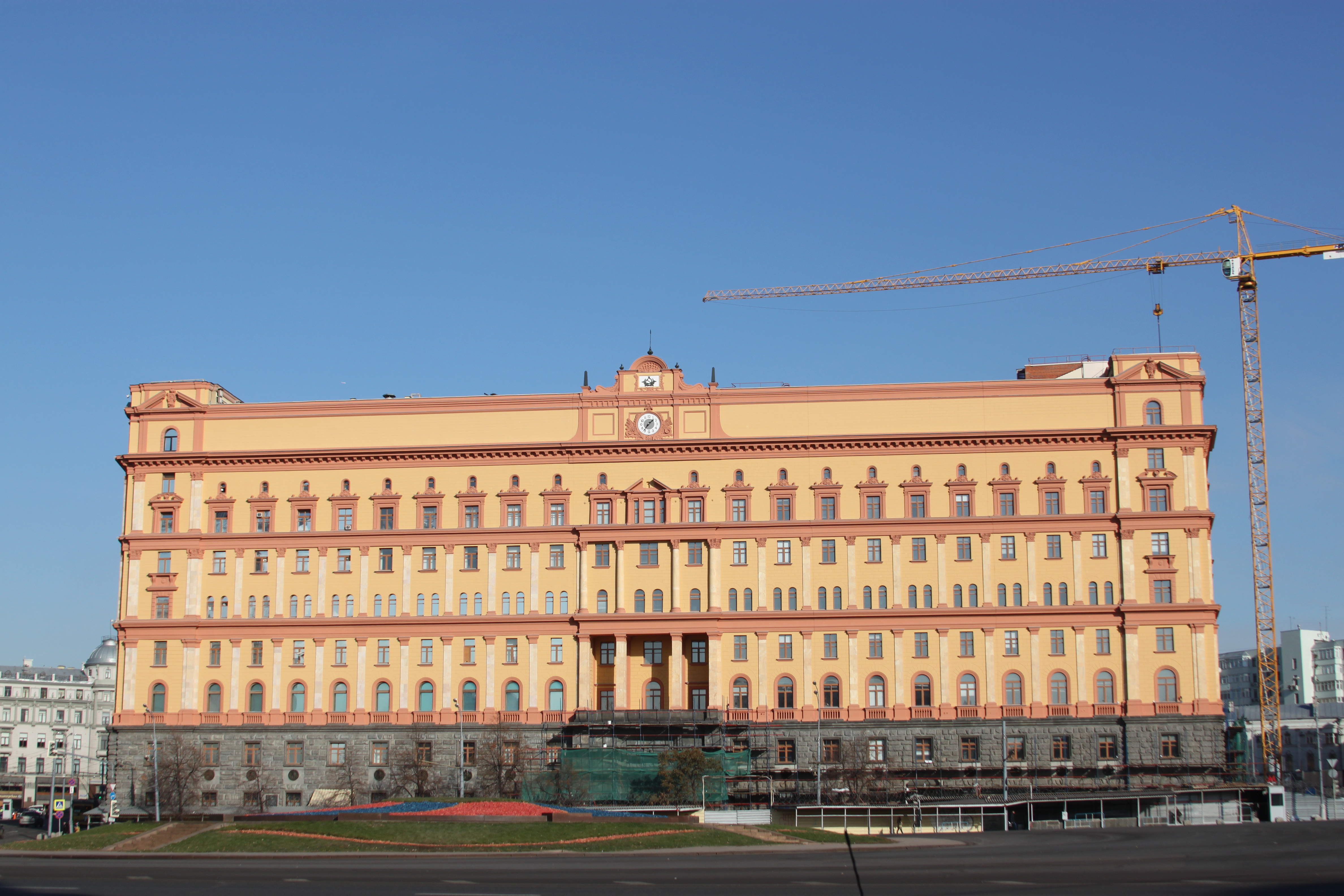 Здание органов госбезопасности на Лубянке 2014 Moscow Lubyanka Building